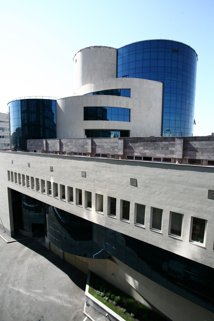 ՀՀ կենտրոնական բանկի նորակառույց շենքը